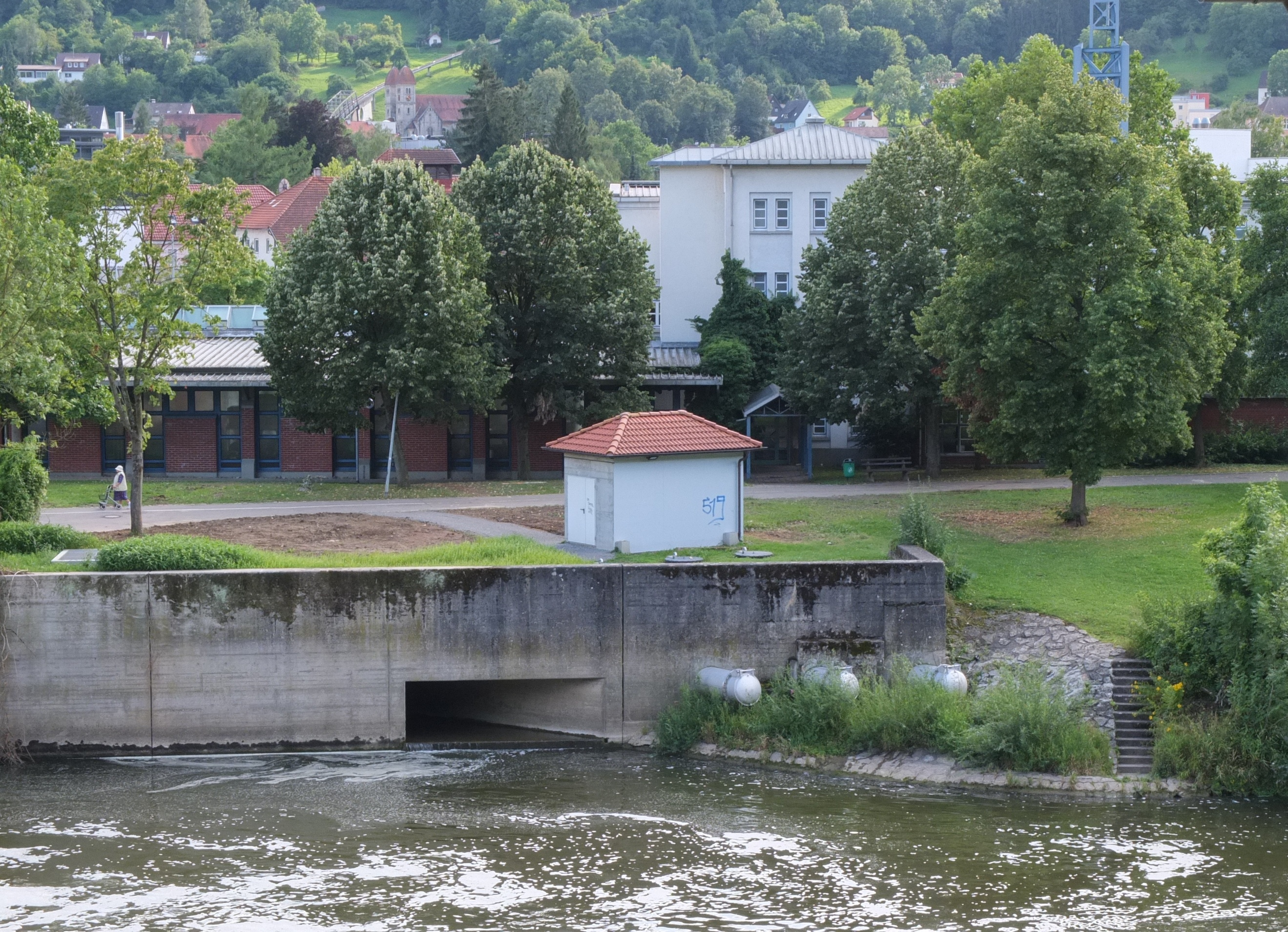 Mündung des verdohlten Künsbachs in den Kocher. Rechts davon sind die Rohre des Hochwasserentlastungskanals, dahinter das Feuerwehrgebäude. Ganz im Hintergrund am Hang sind die griechisch-orthodoxe Josephskirche und die Künzelsauer Bergbahn zu sehen.